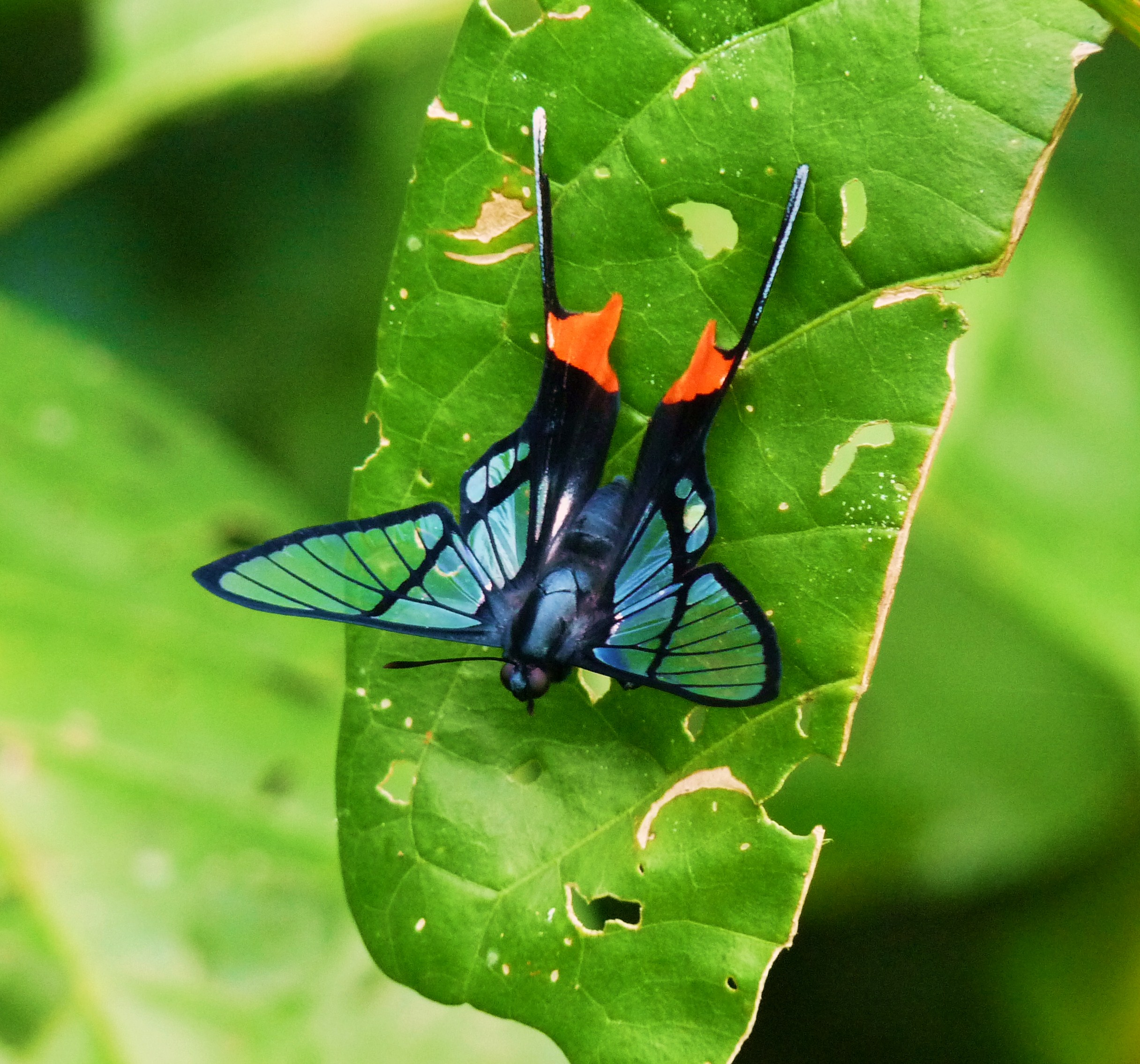 Chorinea octauius photographié en Guyane par Jean-Yves Gallard